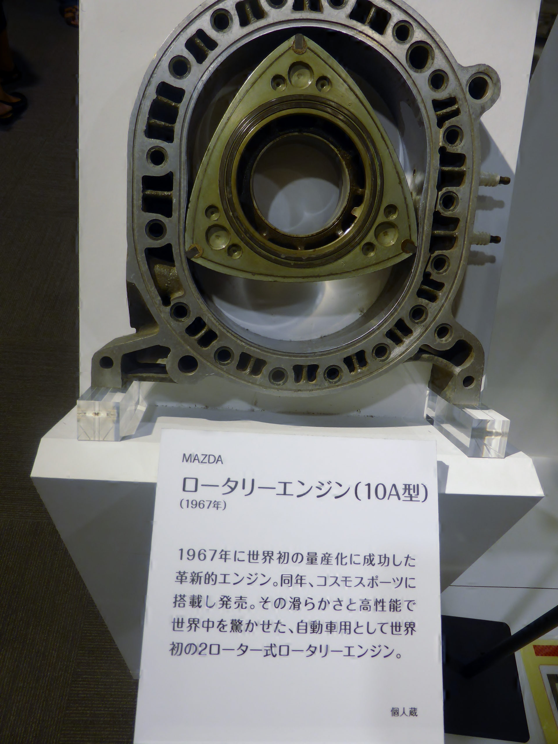 マツダ・10A型ロータリーエンジンを撮影。